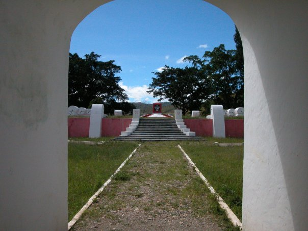 Mahnmal in Aileu für die Opfer der Besetzung durch die Japane im Zweiten Weltkrieg